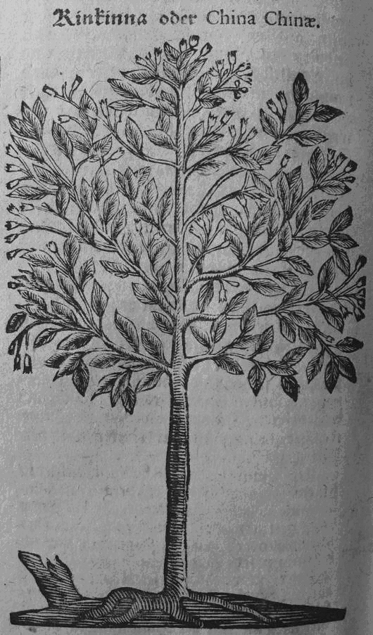 Neu-Vollkomenes Kräuter-Buch/ Worinnen Allerhand Erdgewächse der Bäumen/ Stauden und Kräuter/ welche in alen vier Theilen der Welt/ sonderlich aber in Europa herfür kommen/ neben ihren sonderbahren Eigenschafften/ Tugenden/ und Fürtrefflichen Würckungen/ auch vielen herrlichen Artzney-mittlen und deren Gebrauch/ wider allerley Kranckheiten an Menschen und Vieh/ Mit sonderbahrem Fleisz auff eine gantz neue Art und Weise/ dergleichen biszher in keinem Kräuter-buch gesehen noch gefunden worden/ beschrieben/ Auch mit schönen/ theils neuen Figuren gezieret/ und neben denen ordenlichen so wohl Kräuter- als Kranckheit-Registern/ mit nutzlichen Marginalien vorgestellet sind